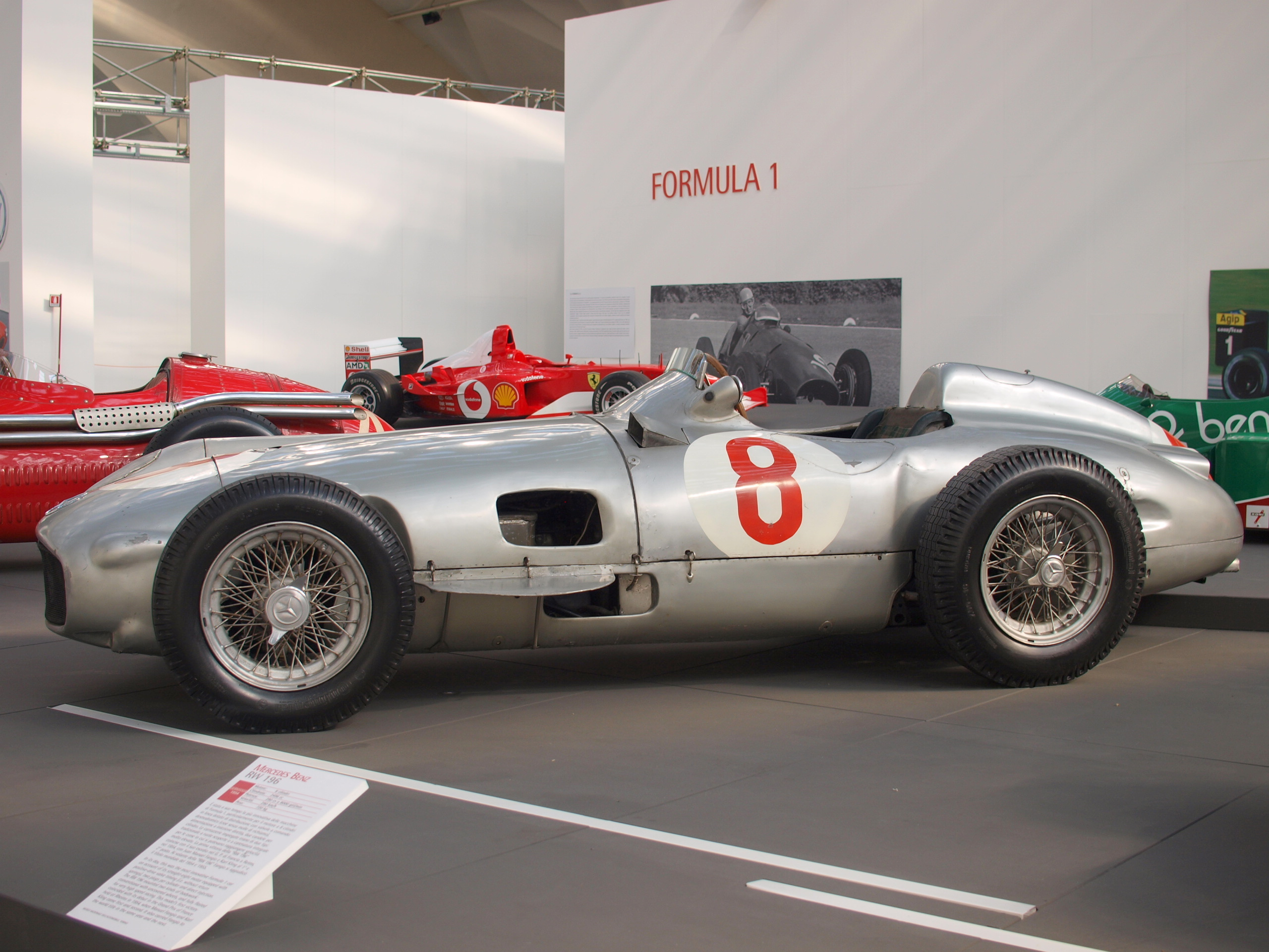 L'evoluzione dell'automobile Mercedes Silver Arrow W196 F-1